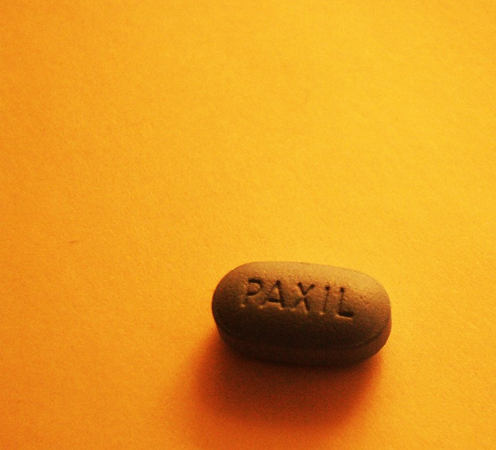 Paxil (paroxetine)